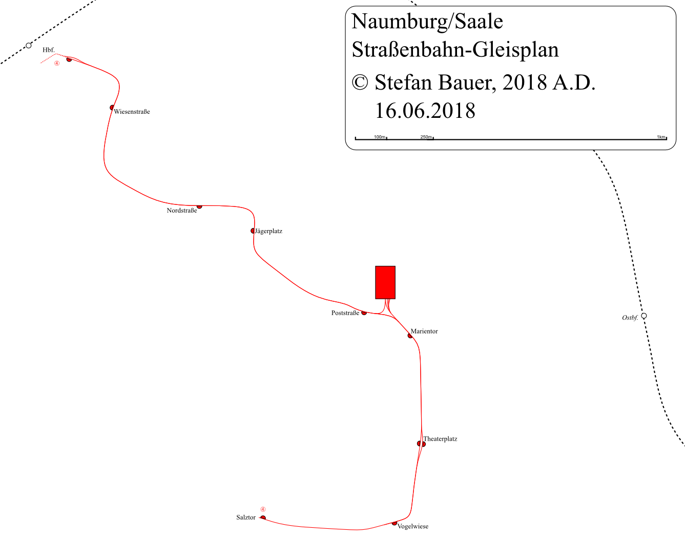 Straßenbahn-Gleisplan Naumburg/Saale 2018